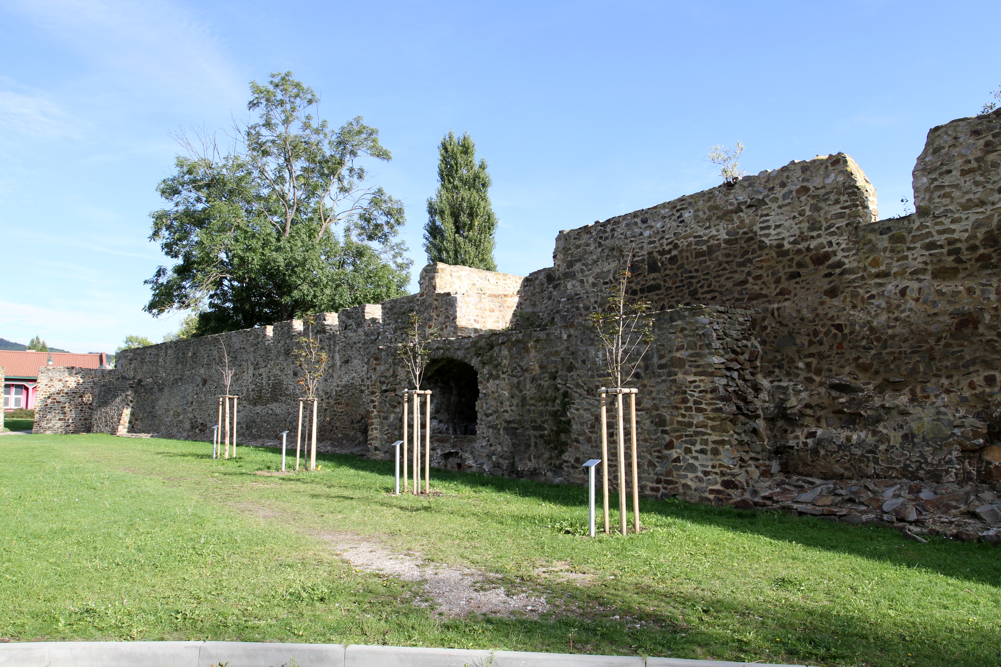 Městské opevnění (Beroun), Beroun